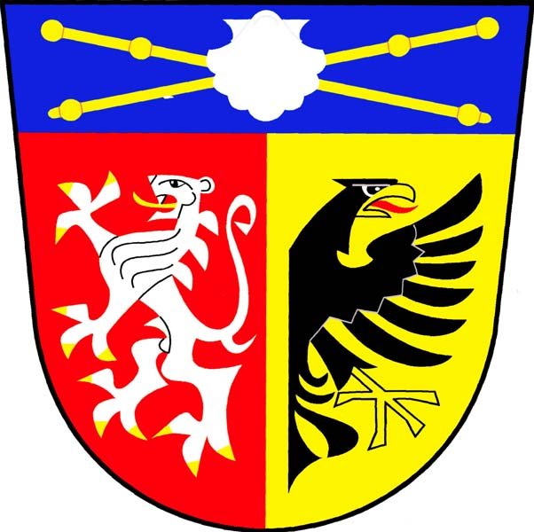 Znak obce Předměřice nad Jizerou